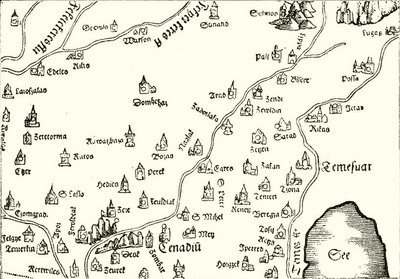 MÁRKI SÁNDOR DÓSA GYÖRGY 1470-1514 A MAGYAR TUDOMÁNYOS AKADÉMIA SEGÉLYEZÉSÉVEL KIADJA A MAGYAR TÖRTÉNELMI TÁRSULAT SZERKESZTI DR. DÉZSI LAJOS BUDAPEST AZ ATHENAEUM R.-T. KÖNYVNYOMDÁJA 1913